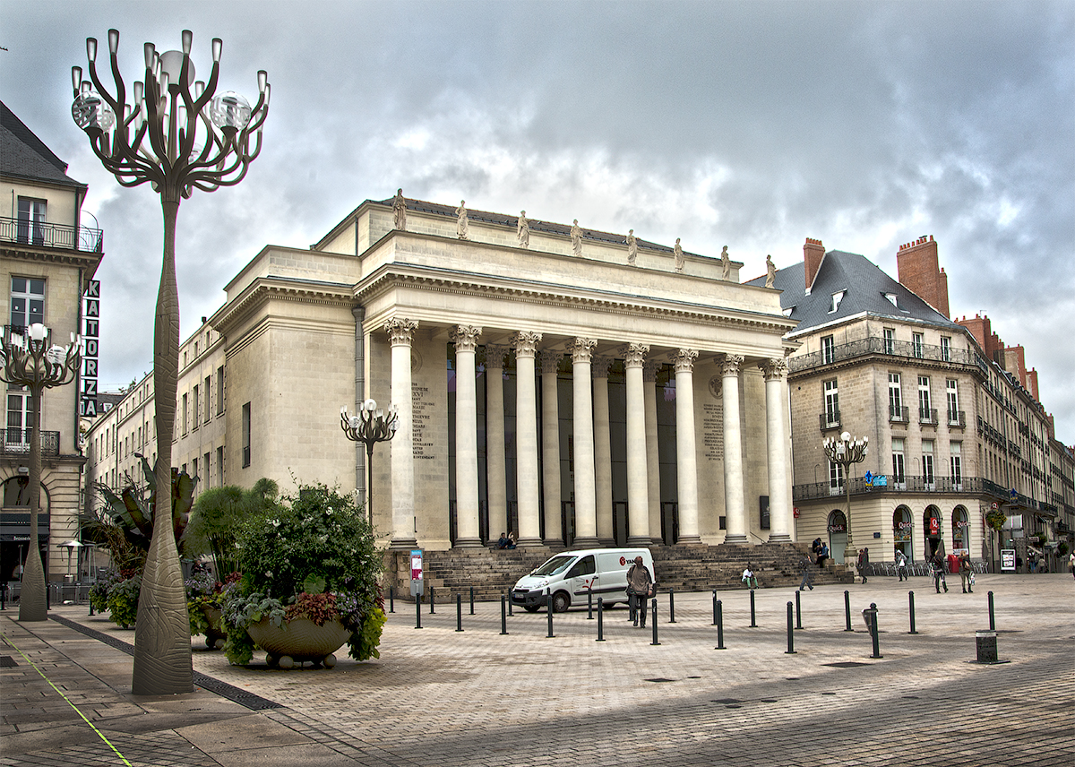 Le théâtre Graslin est la salle d'opéra de Nantes (Loire-Atlantique). Édifié à la fin du XVIIIe siècle, il est inscrit à l'inventaire des monuments historiques depuis le 8 décembre 1998.